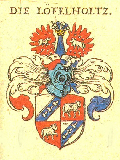 Wappen der Nürnberger Patrizierfamilie Löffelholz von Kolberg